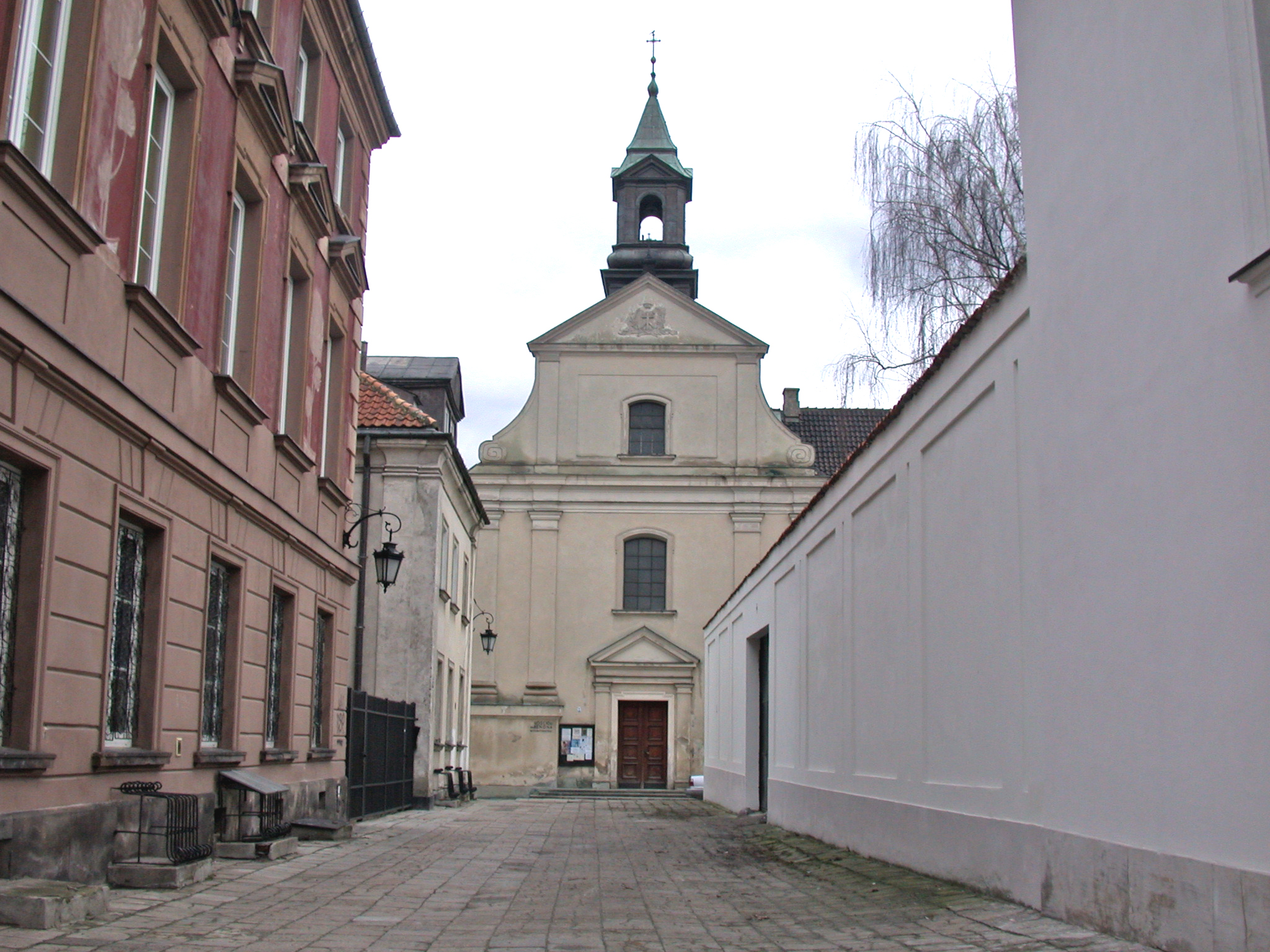 Varsavia, chiesa di San Benon (kóściół Św. Benona), sulla via Piesza.